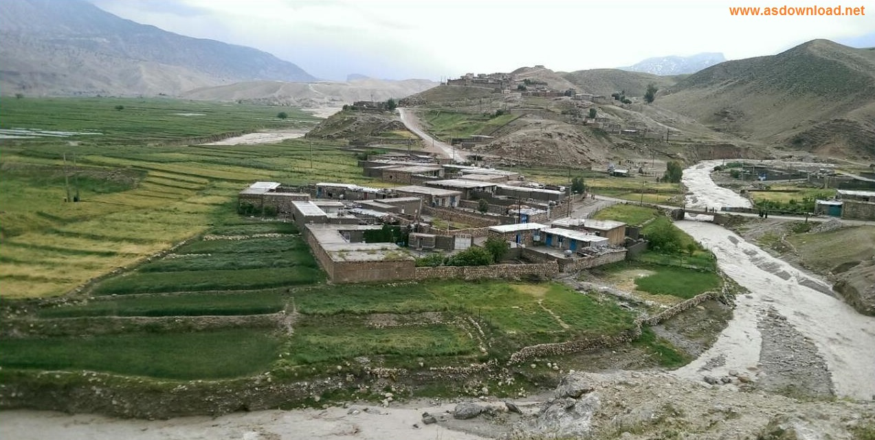 دره بنیاب در یک روز بارانی